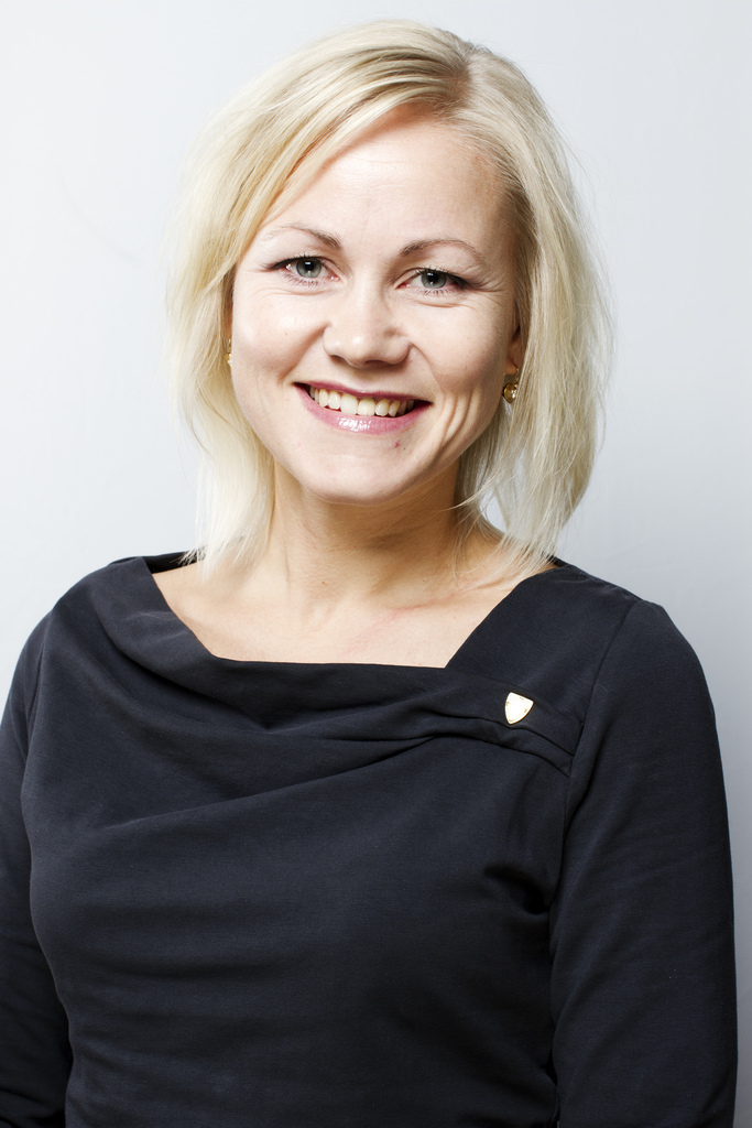 Portrett av fylkesrådsleder Ingvild Kjerkol (Ap) i Nord-Trøndelag.